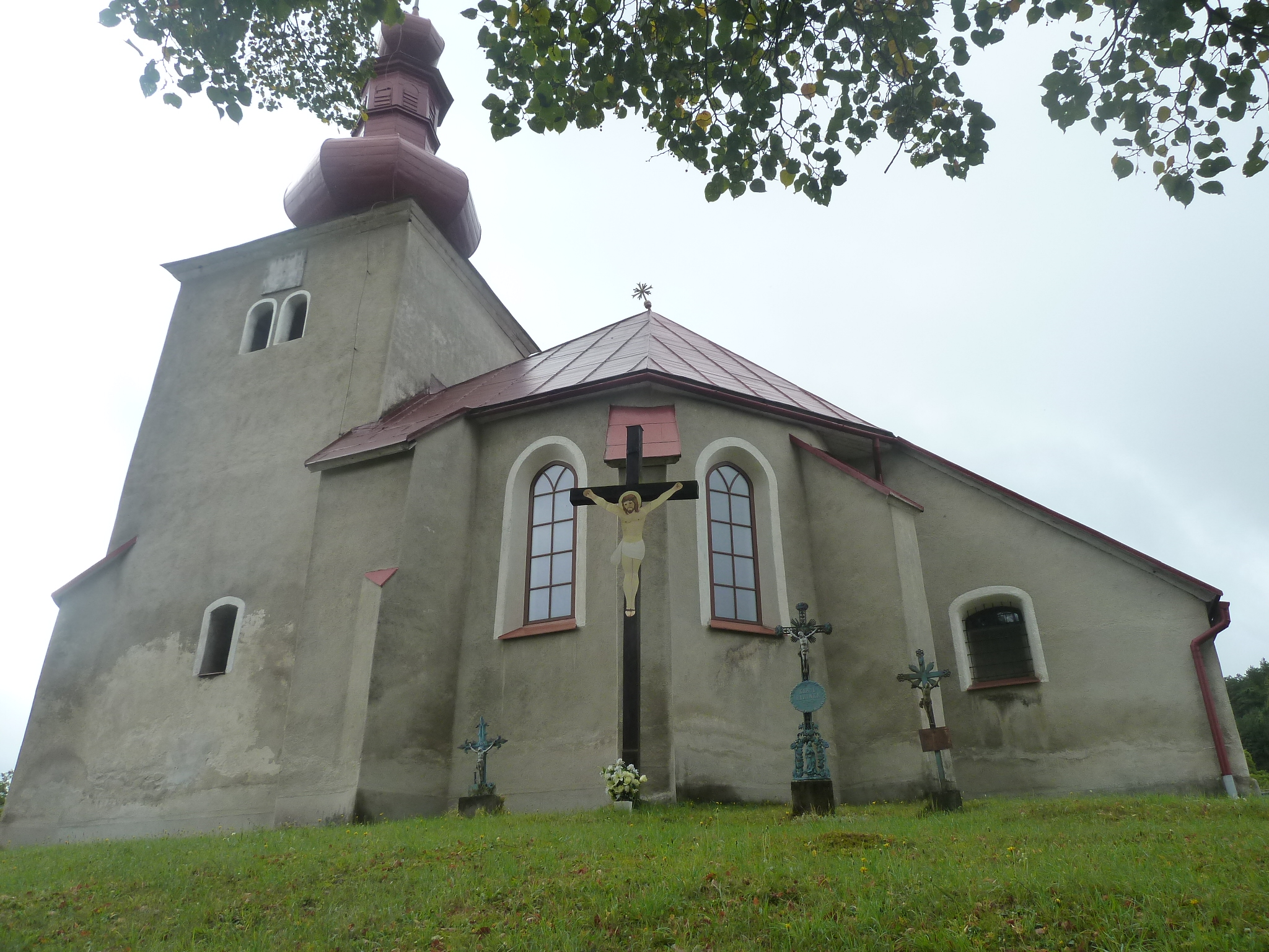 Kostol Všetkých svätých v Slovenskom Pravne